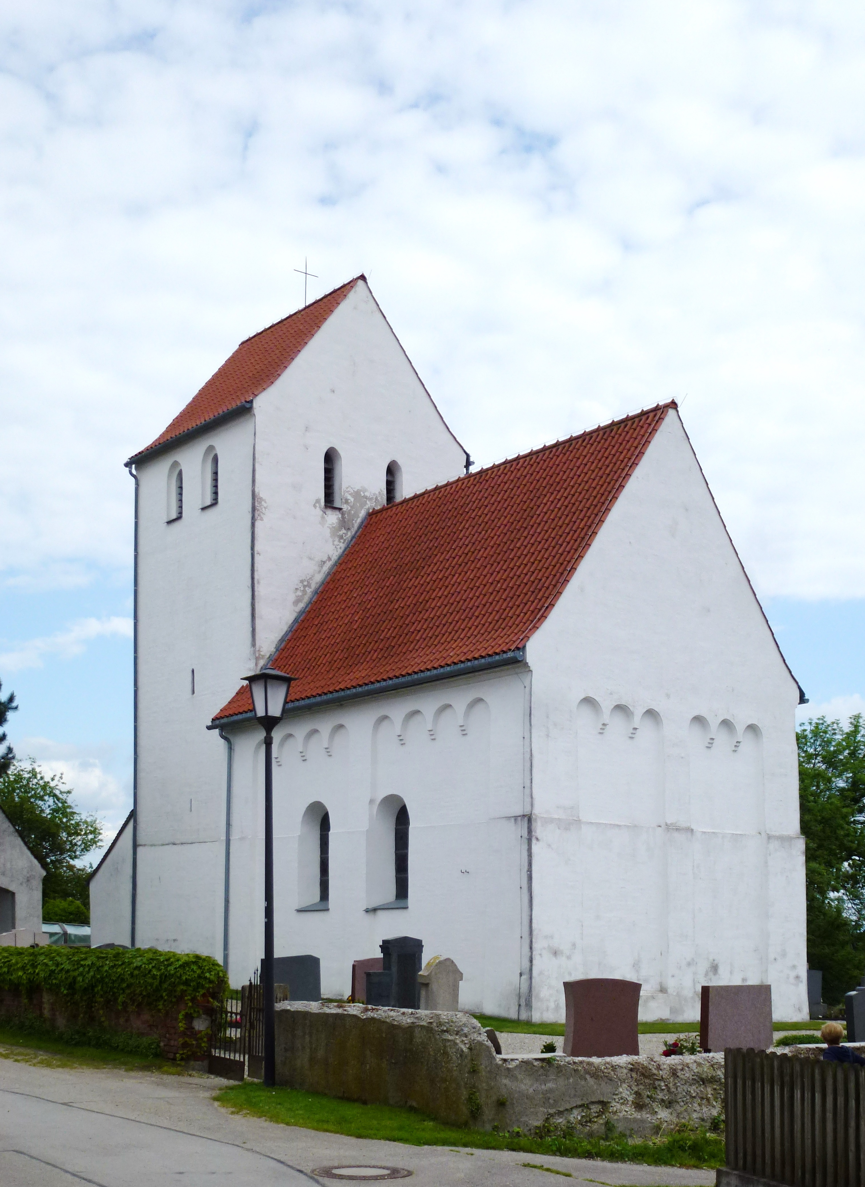 Palsweis, Sankt-Urban-Strasse 18, Katholische Filialkirche Sankt Urban. Ansicht von NW